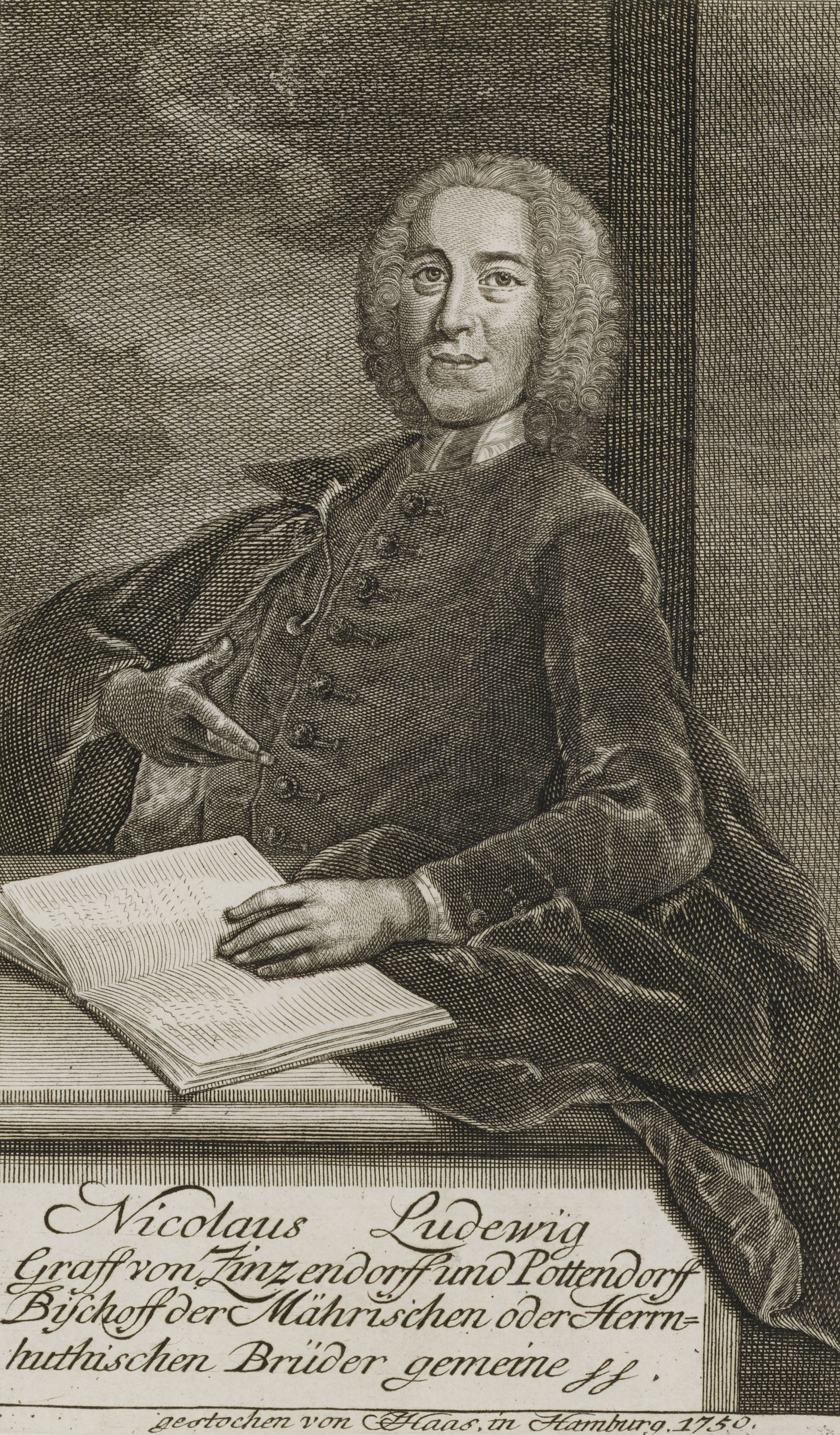 Nicolaus Ludewig Graff von Zinzendorf und Pottendorf Bischoff der Mährischen oder Herrnhuthischen Brüder gemeine ff